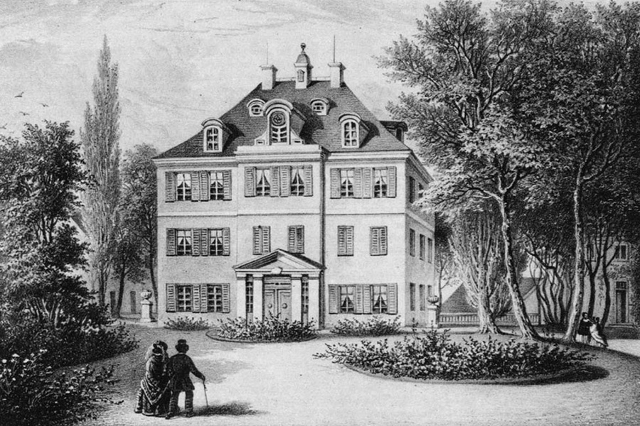 Das Herrenhaus des Rittergutes Abtnaundorf um 1850